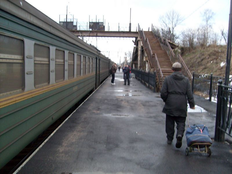 Станция Мартышкино